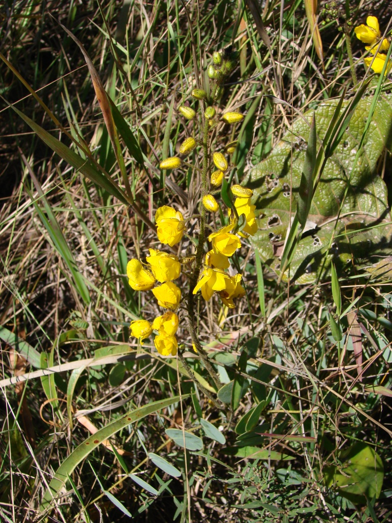 Chamaecrista lundii - FABACEAE - Jardim Botânico de Brasília - Distrito Federal - Brasil.